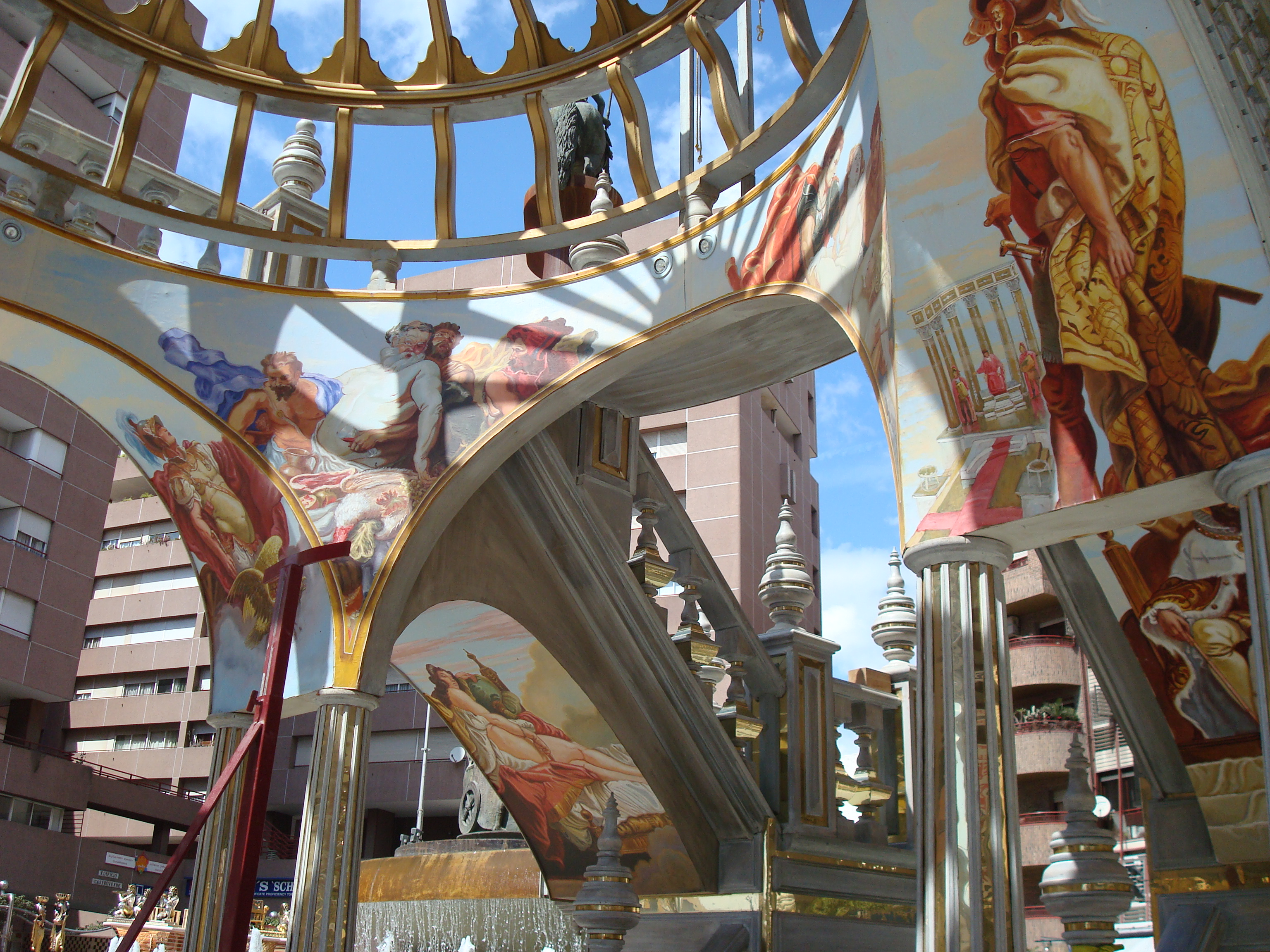 Carroza del Ángel Caido del Paso Azul, Semana Santa, Lorca